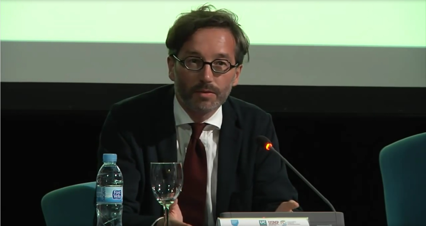 José María Lassalle, June 2012.